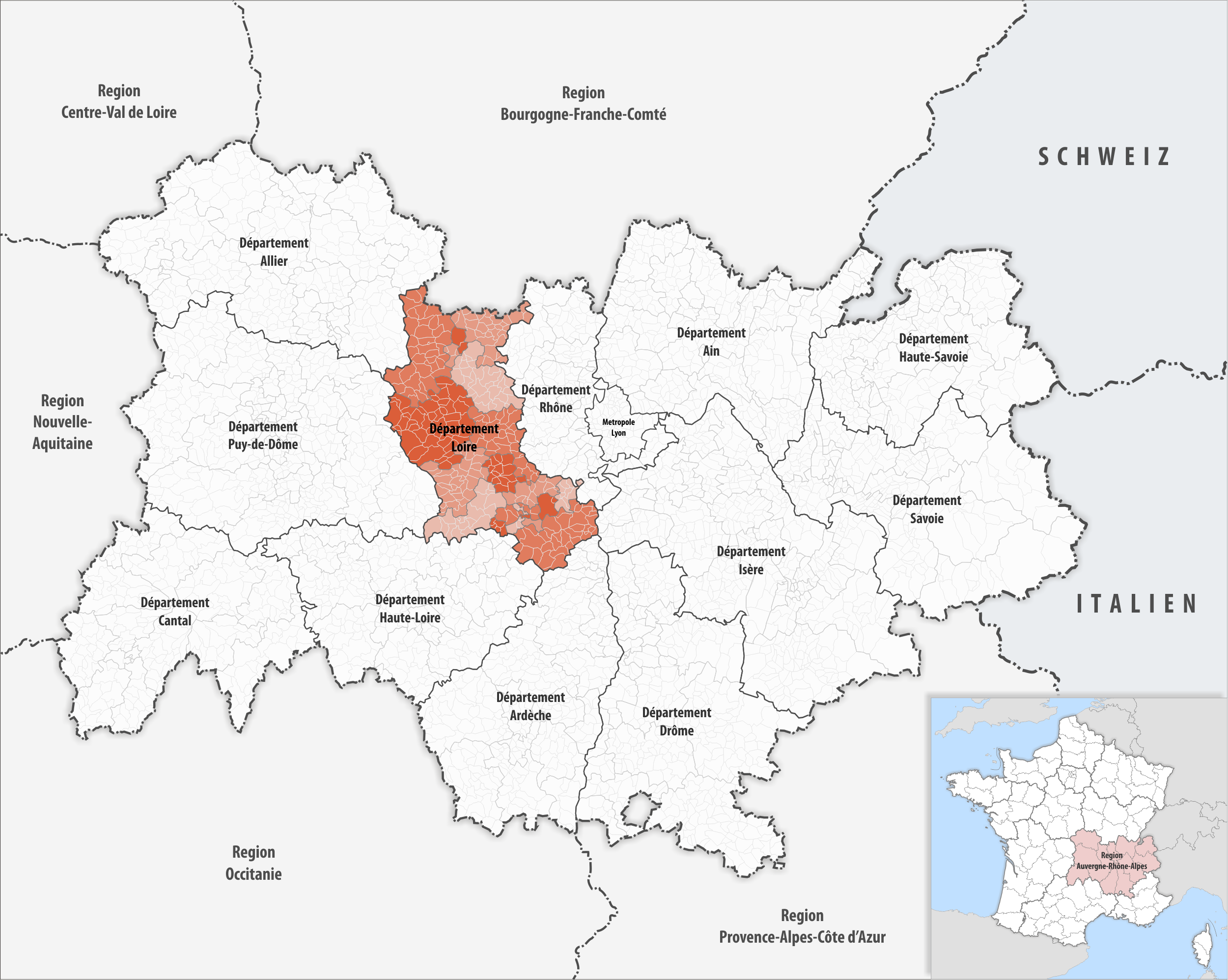 Lage des Departements Loire